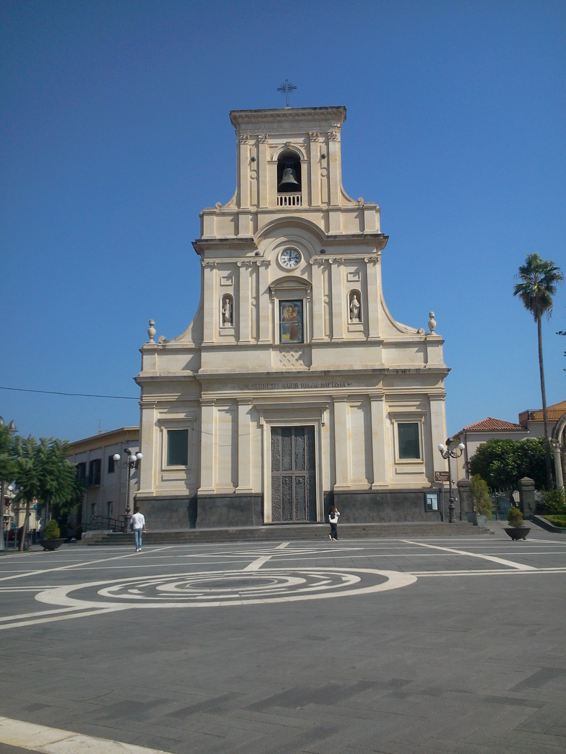 Questo è il Duomo di San Giovanni la Punta.